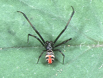 male Latrodectus elegans from Okinawa.